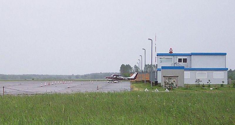 Flugplatz Rechlin-Lärz, eigenes Bild